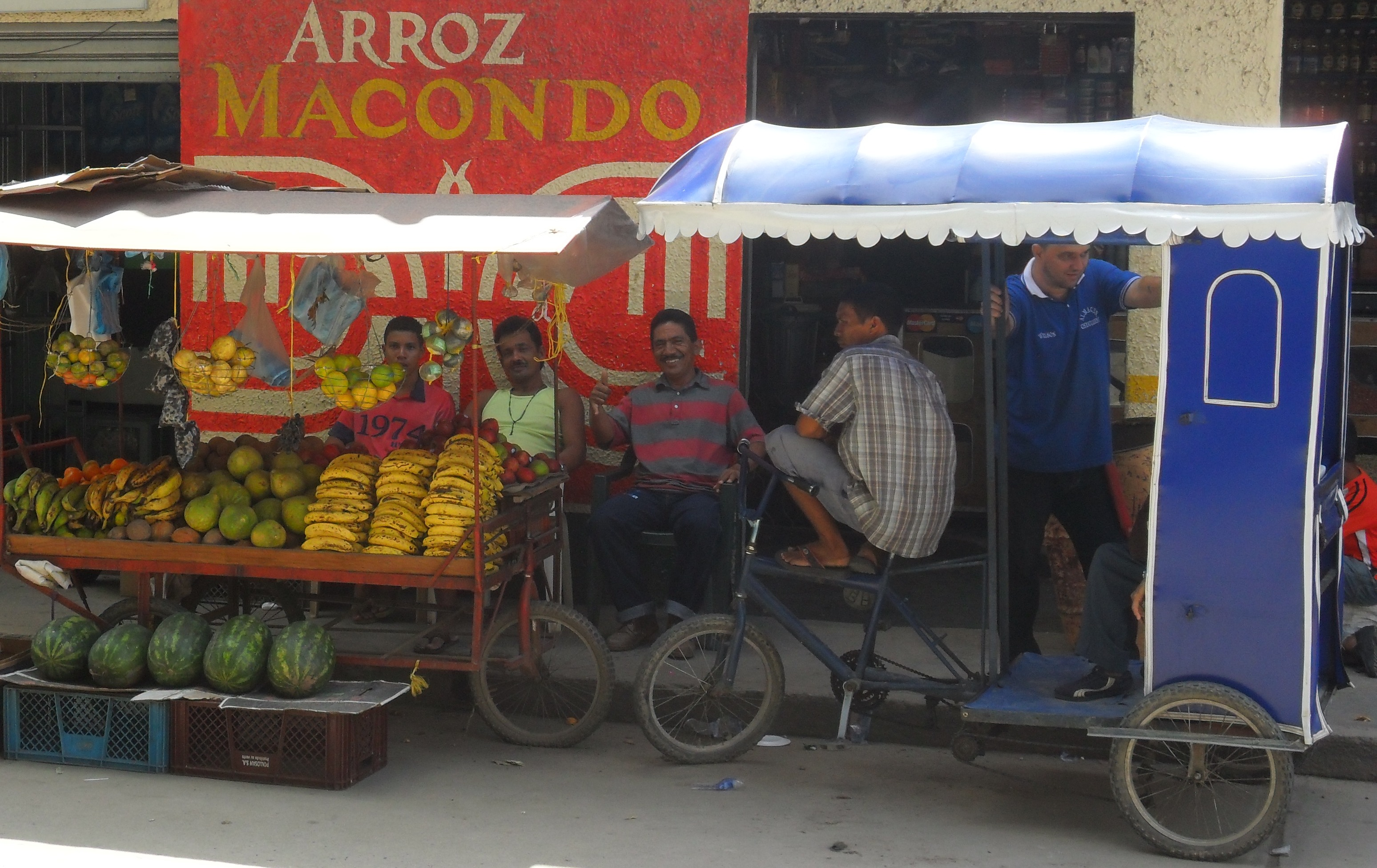 A very typical sight on macondonian streets